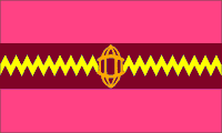 Summary Drapeau de la principauté de Dhrangadhra Source Nataraja Statut Nataraja Catégorie:Drapeau de principauté des Indes